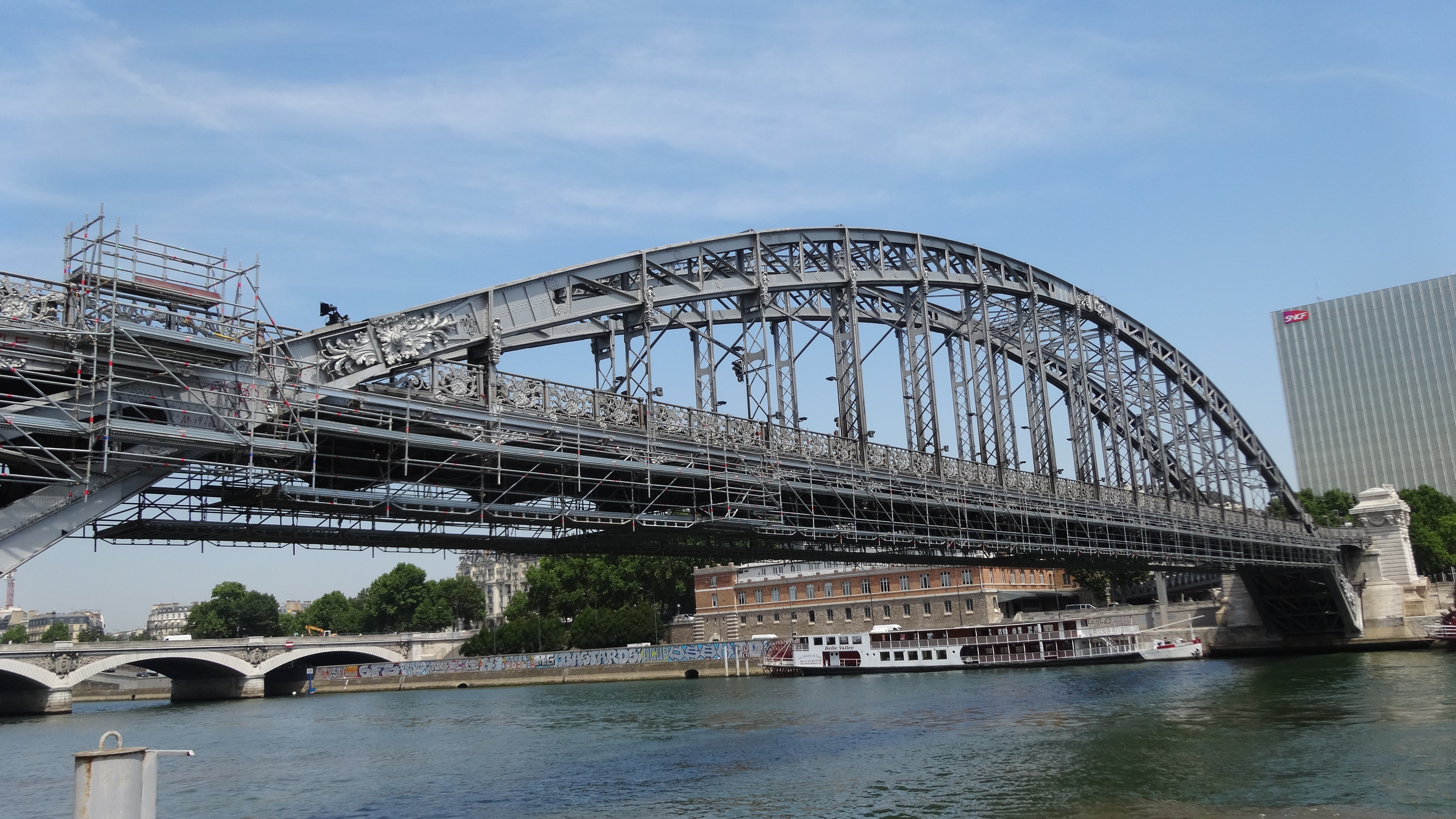 Vue d'ensemble Viaduc d'Austerlitz sur la Gare de Lyon